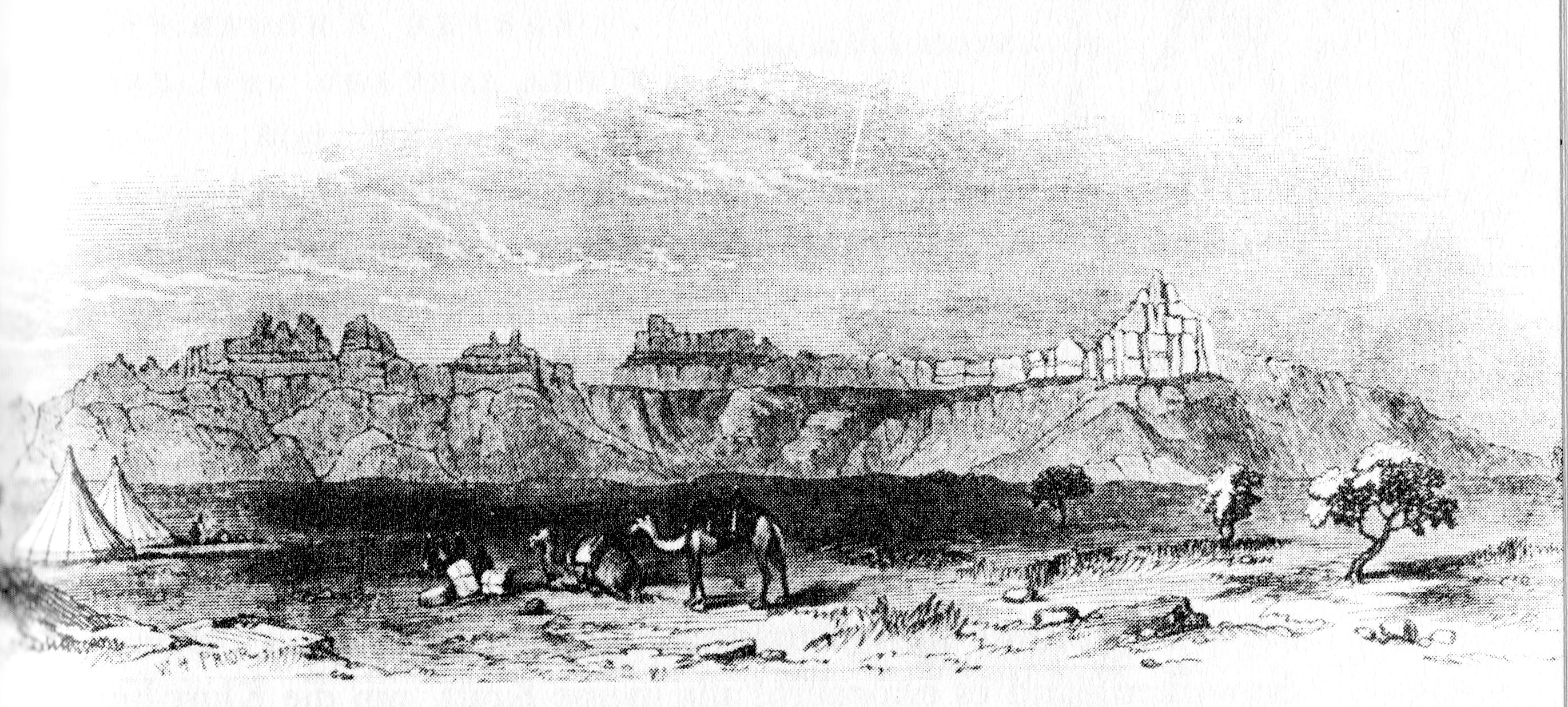 Idinen-Massiv in Libyen